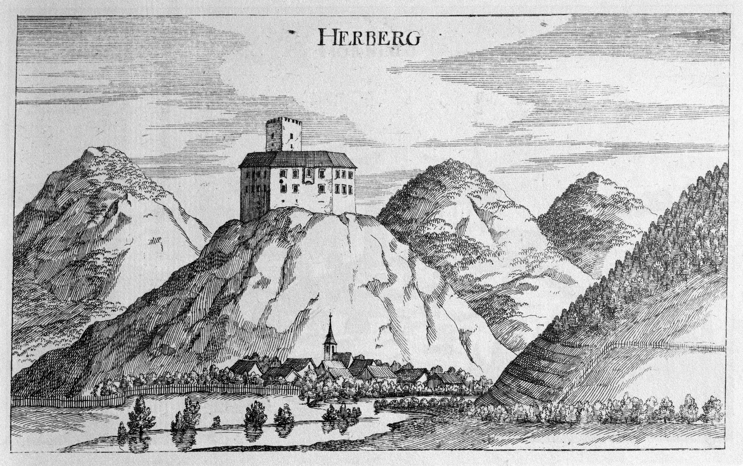 G. M. Vischers Käyserlichen Geographi, Topographia Ducatus Stiriae, Das ist: Eigentliche Delineation / und Abbildung aller Städte / Schlösser / Marcktfleck / Lustgärten / Probsteyen / Stiffter / Clöster und Kirchen / so es sich im Herzogthumb Steyrmarck befinden; Und anjetzo Umb einen billichen Preyß zu finden seynd Bey Johann Bitsch Universitäts Buchhandlern / Auff dem Juden=Platz bey der guldenen Saulen. Graz 1681 Die Nummerierung der Dateien folgt der alphabetischen Reihung der Ortsnamen